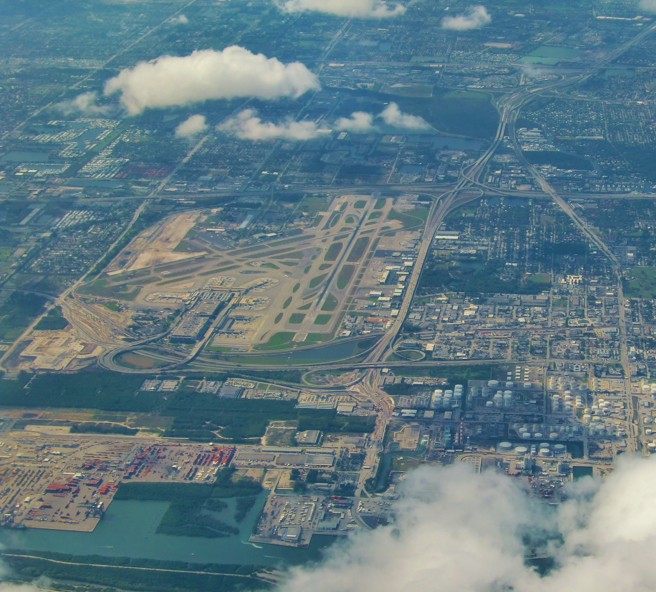 Luftaufnahme des Flughafens Fort Lauderdale-Hollywood International Airport